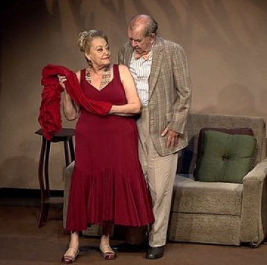 Os atores brasileiros Umberto Magnani e Suely Franco na peça teatral Elza e Fred.